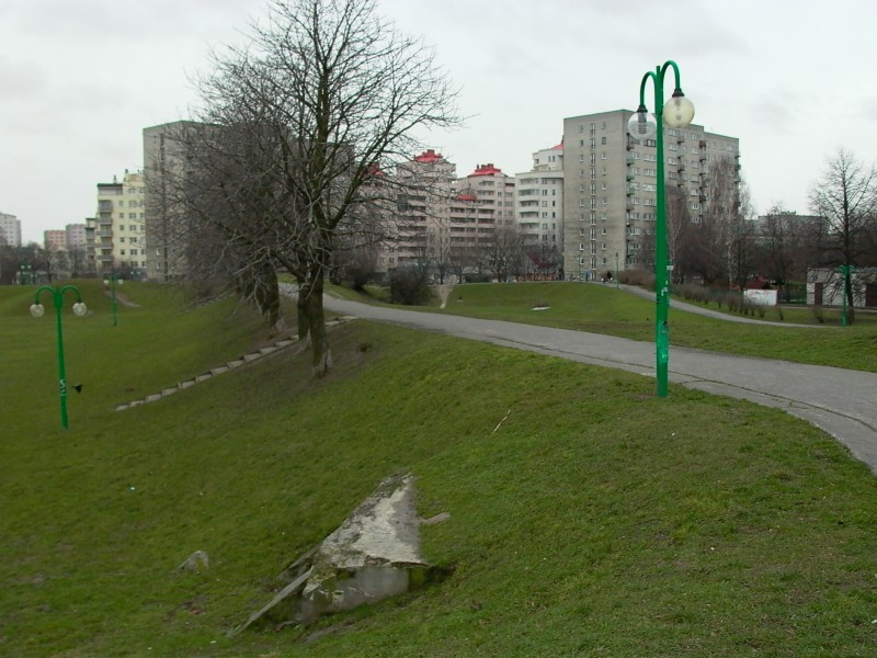 Fotografia przedstawia tzw. Fort "Rakowiec" (Fort Tscha-M) w Warszawie. Autor: Zbigniew Strucki